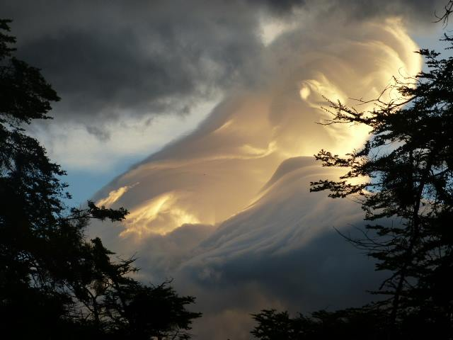 Ventana hacia la luz en un día oscuro.